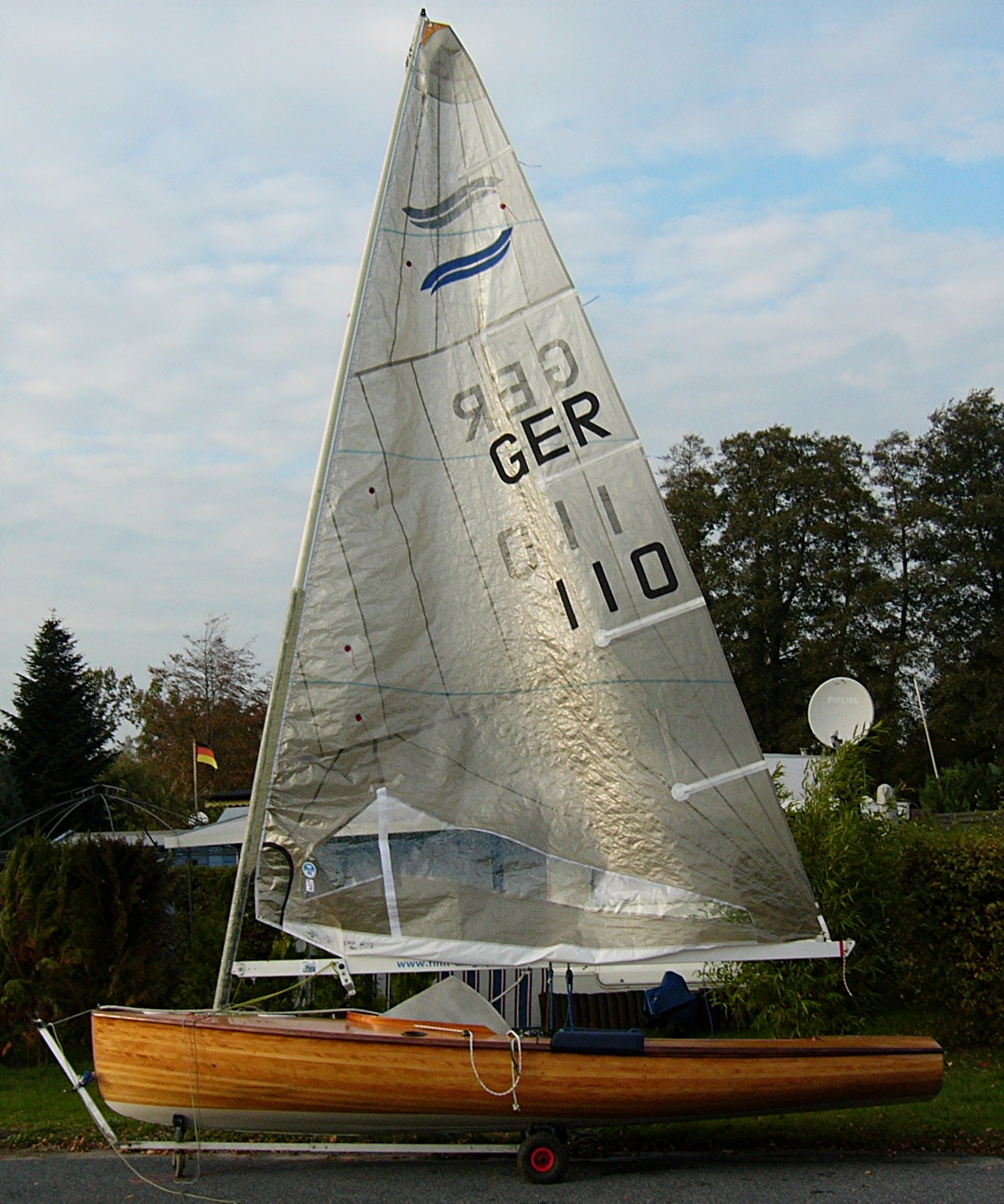 Classic-Finn G 1141, Bj. 1970 mit modernem Carbonmast und Foliensegel